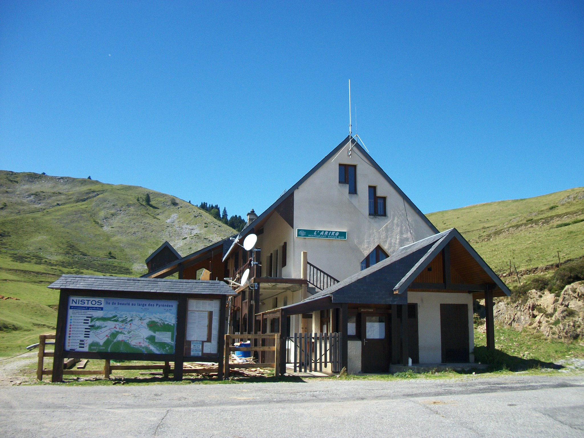 Accueil billeterie, restaurant, hébergement, magasin de location